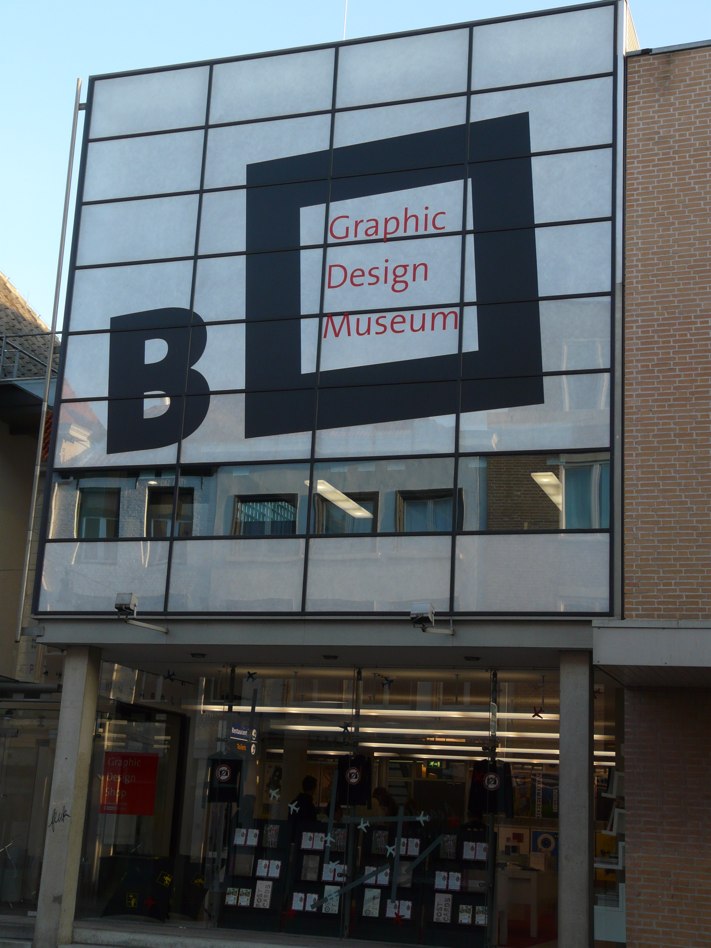 Zicht op de voorzijde van het voormalige Graphic Design Museum in Breda. Vanaf voorjaar 2017 verder gegaan onder de naam Stedelijk Museum Breda gevestigd in de Boschstraat in het centrum van Breda